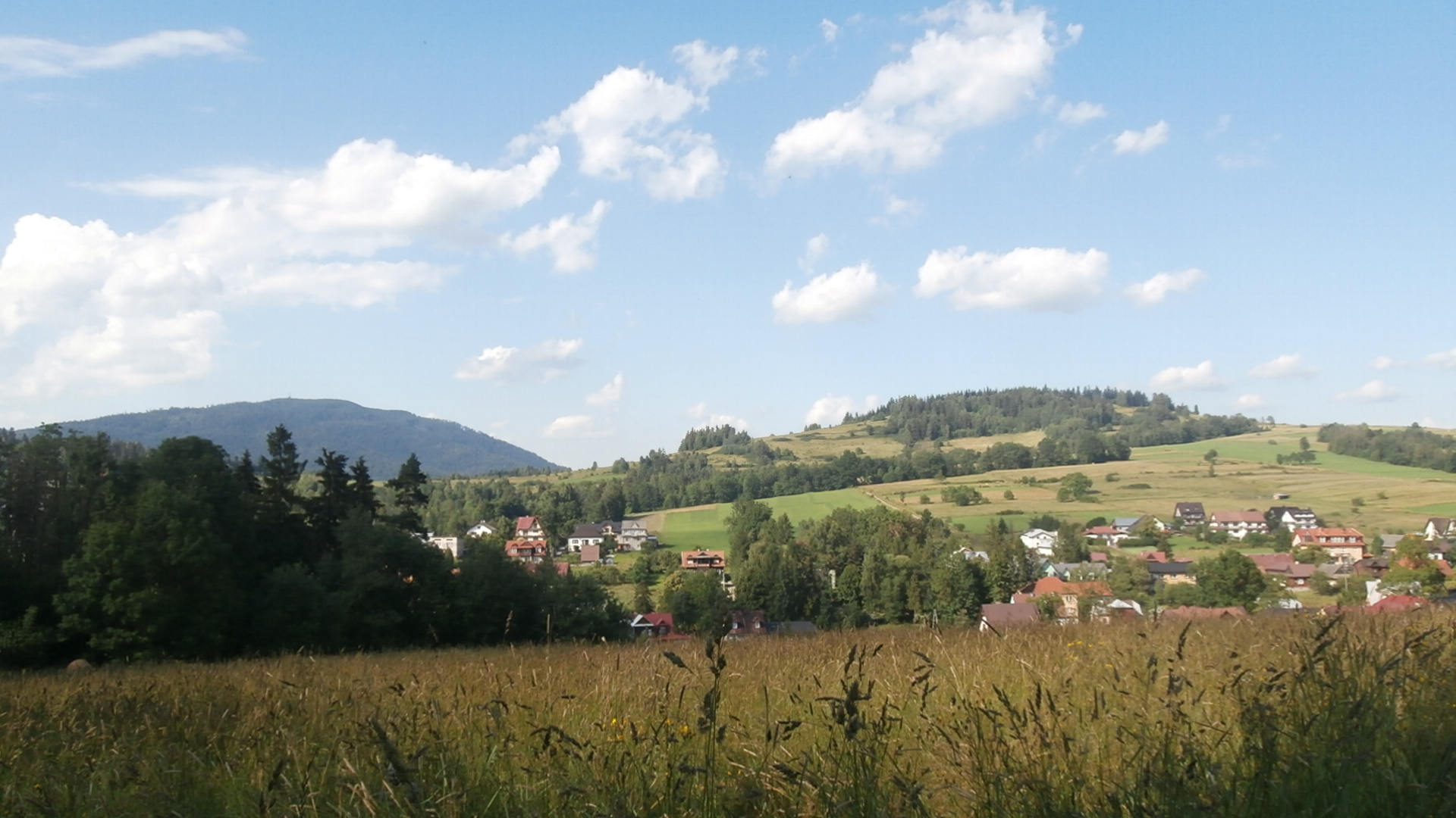 Widok z Rabki (Nowy Świat, Ul. Ogrodowa) na Grzebień (po prawej) oraz Luboń Wielki (po lewej).